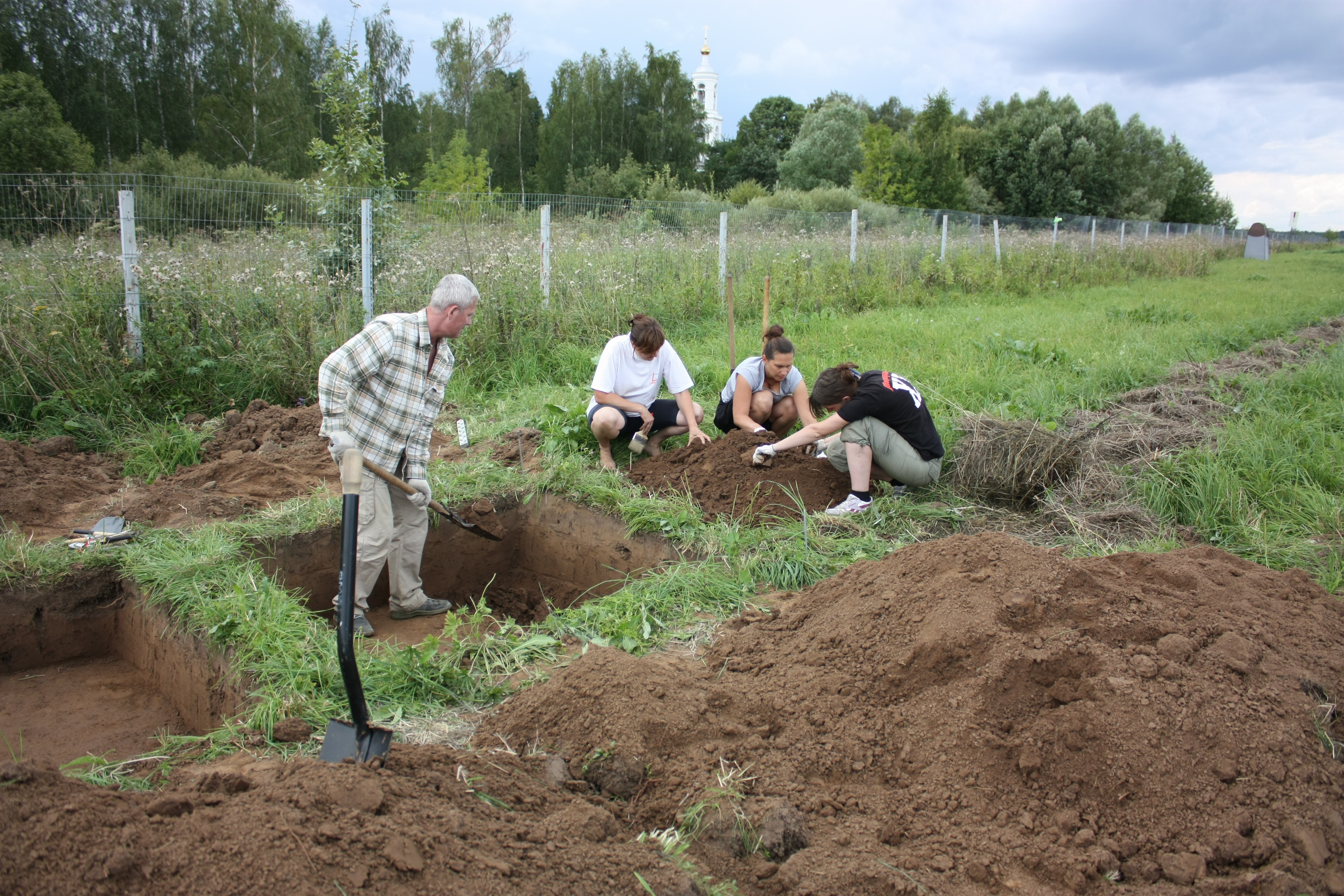 Раскопки городища Дубна в 2012 году